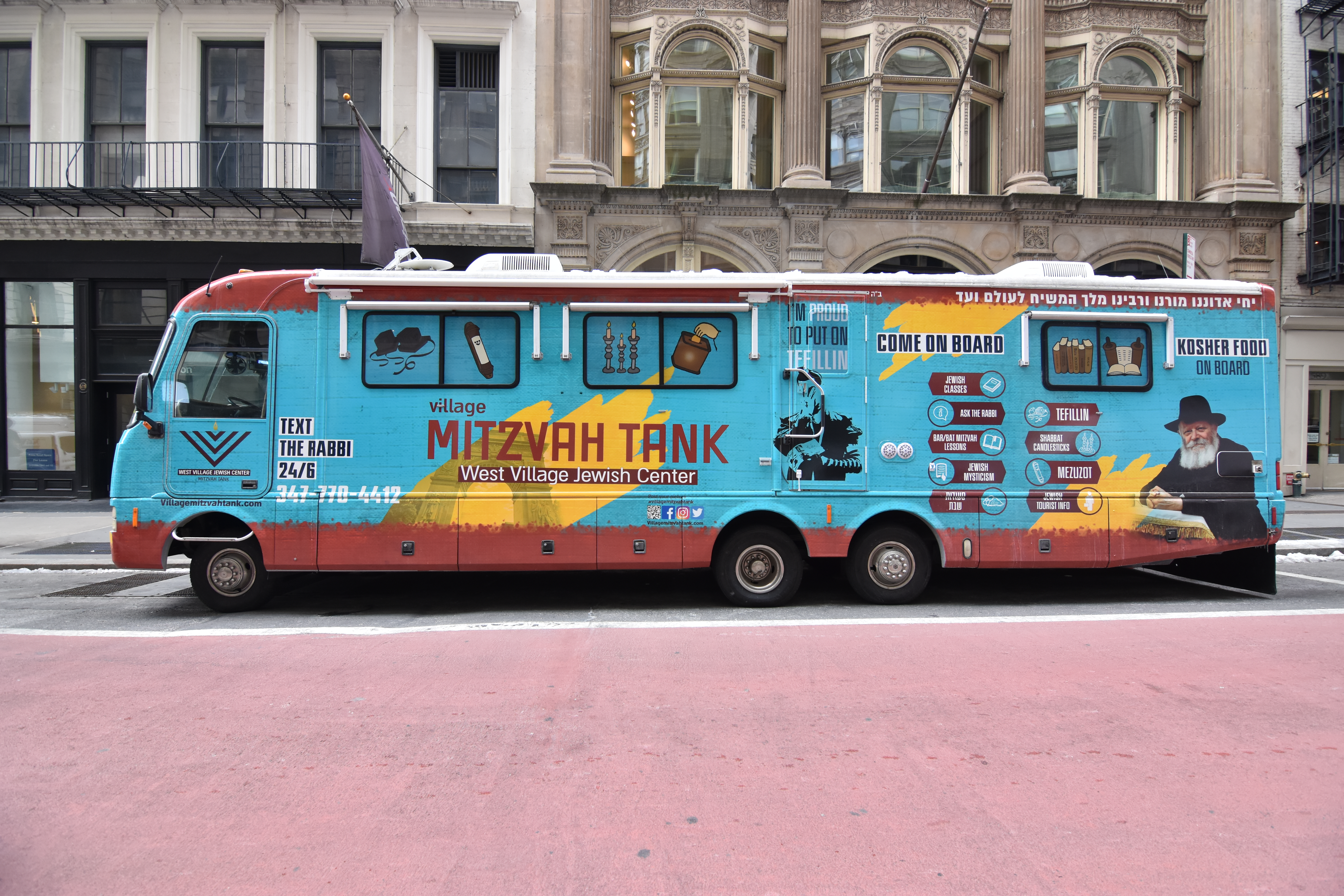 בשכונת ווסט וילג ניורק קיים טנק יחודי שפועל גם כבית חבד נייד כולל שיעורים וסעודות שבת בתוך הטנק